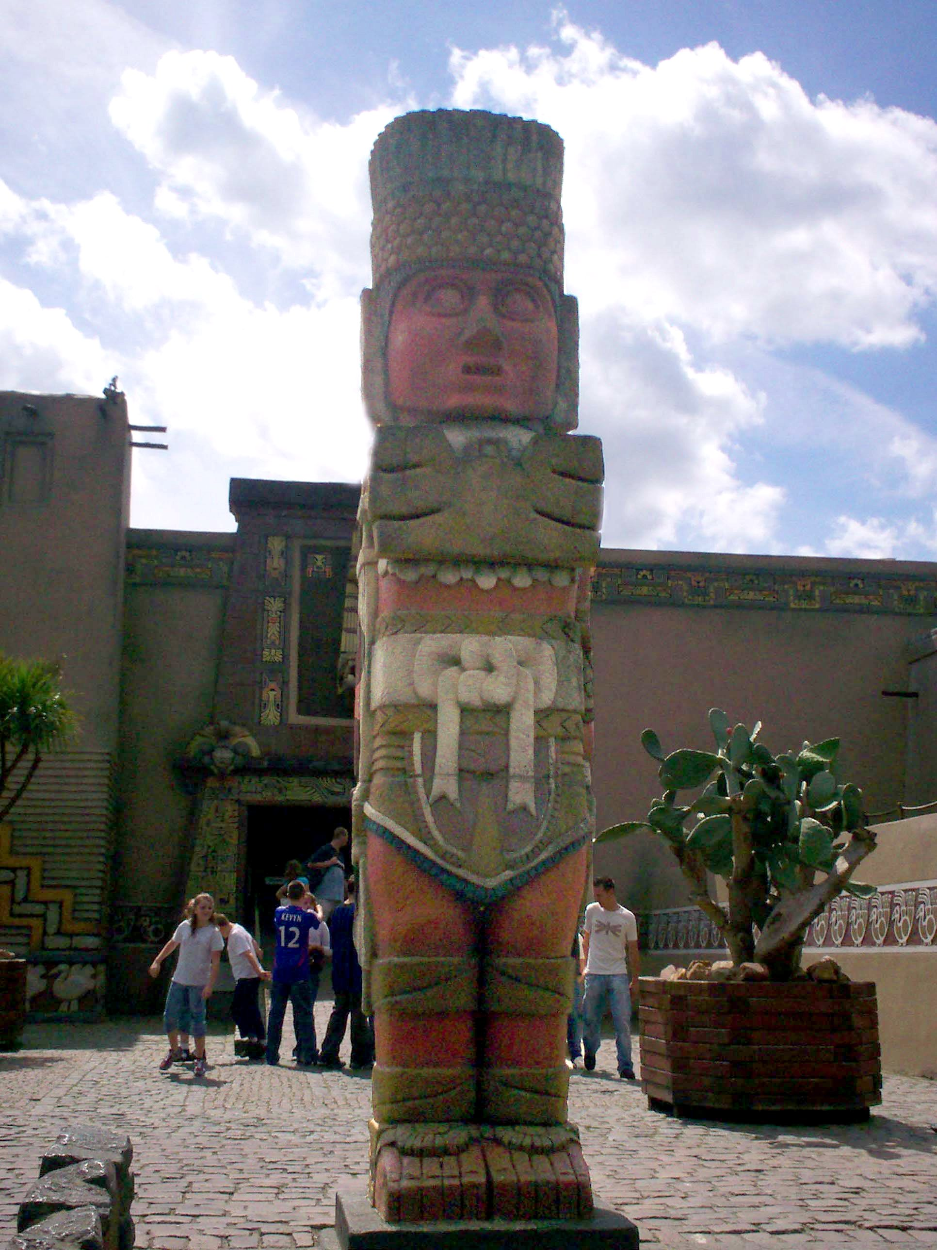 Beeld bij uitgang Piraña (Efteling).